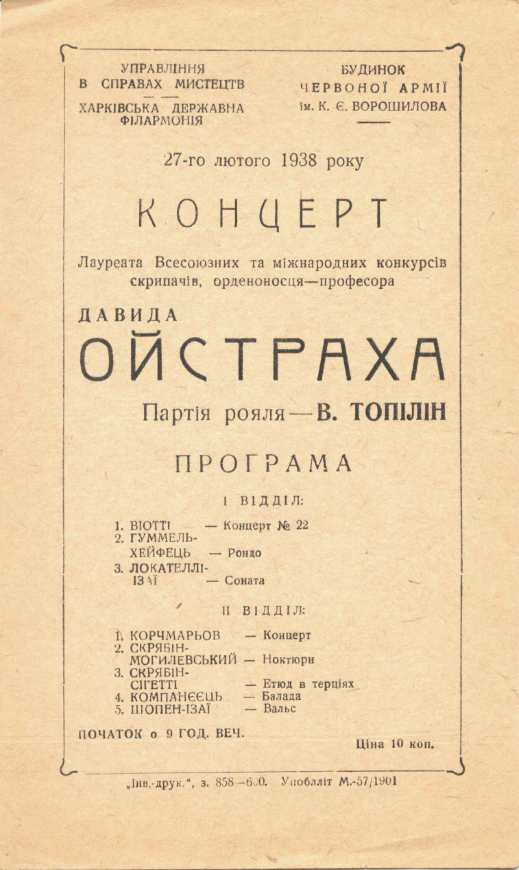 Афиша концерта Давида Ойстраха при участии пианиста Всеволода Топилина,который состоялся в зале Харьковского Дома РККА (здание уничтожено во время ВОВ) в феврале 1938 года